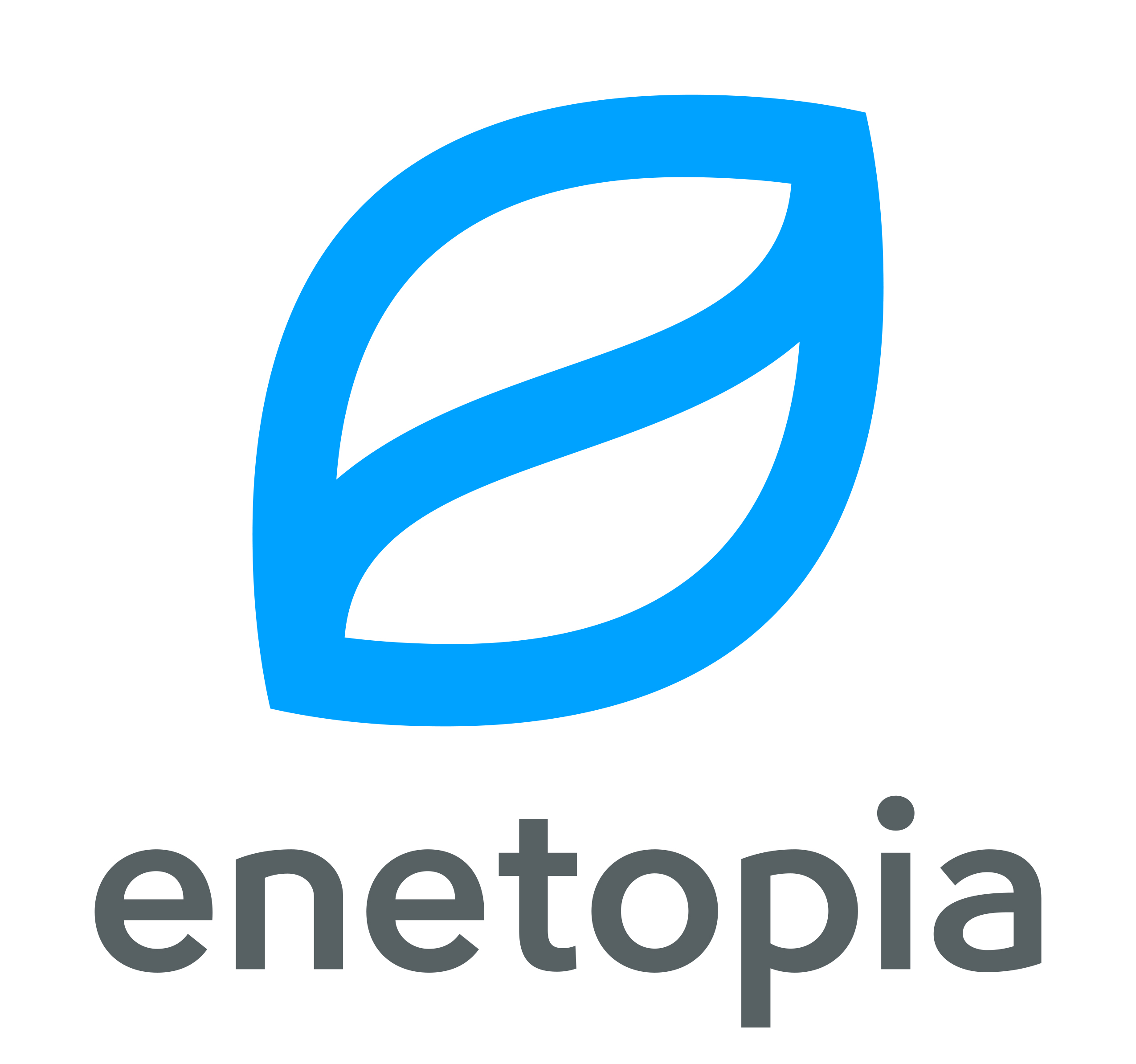 enetopia